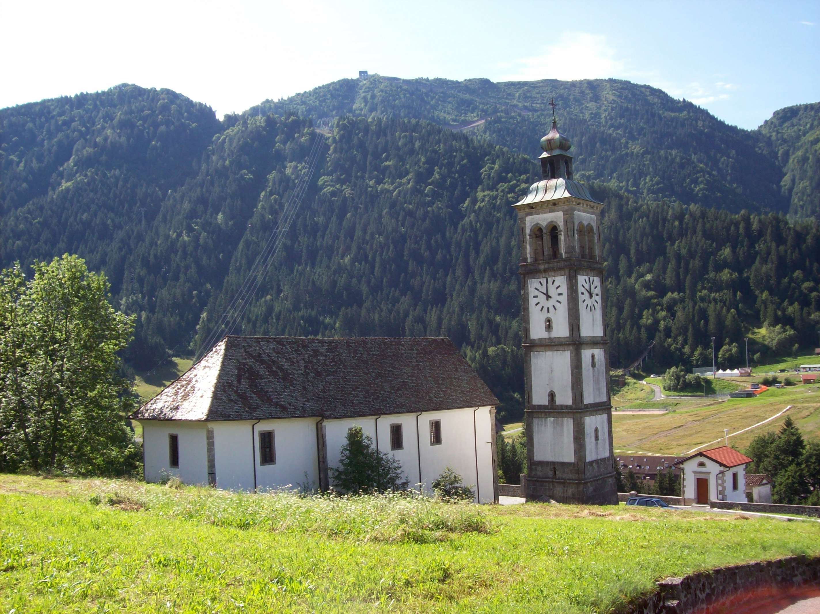 Ravascletto (UD) Italia, Chiesa parrocchiale di San Matteo